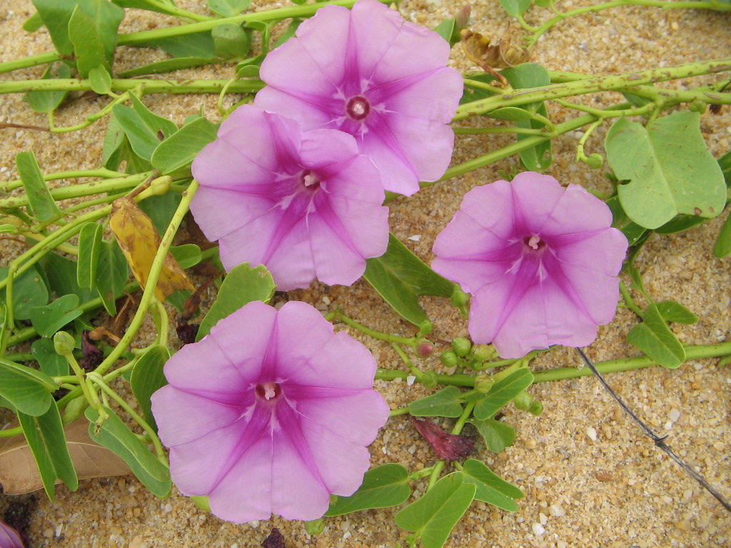 Ipomoea pes-caprae. @Hakcipta Mohamed Yosri Mohamed Yong.